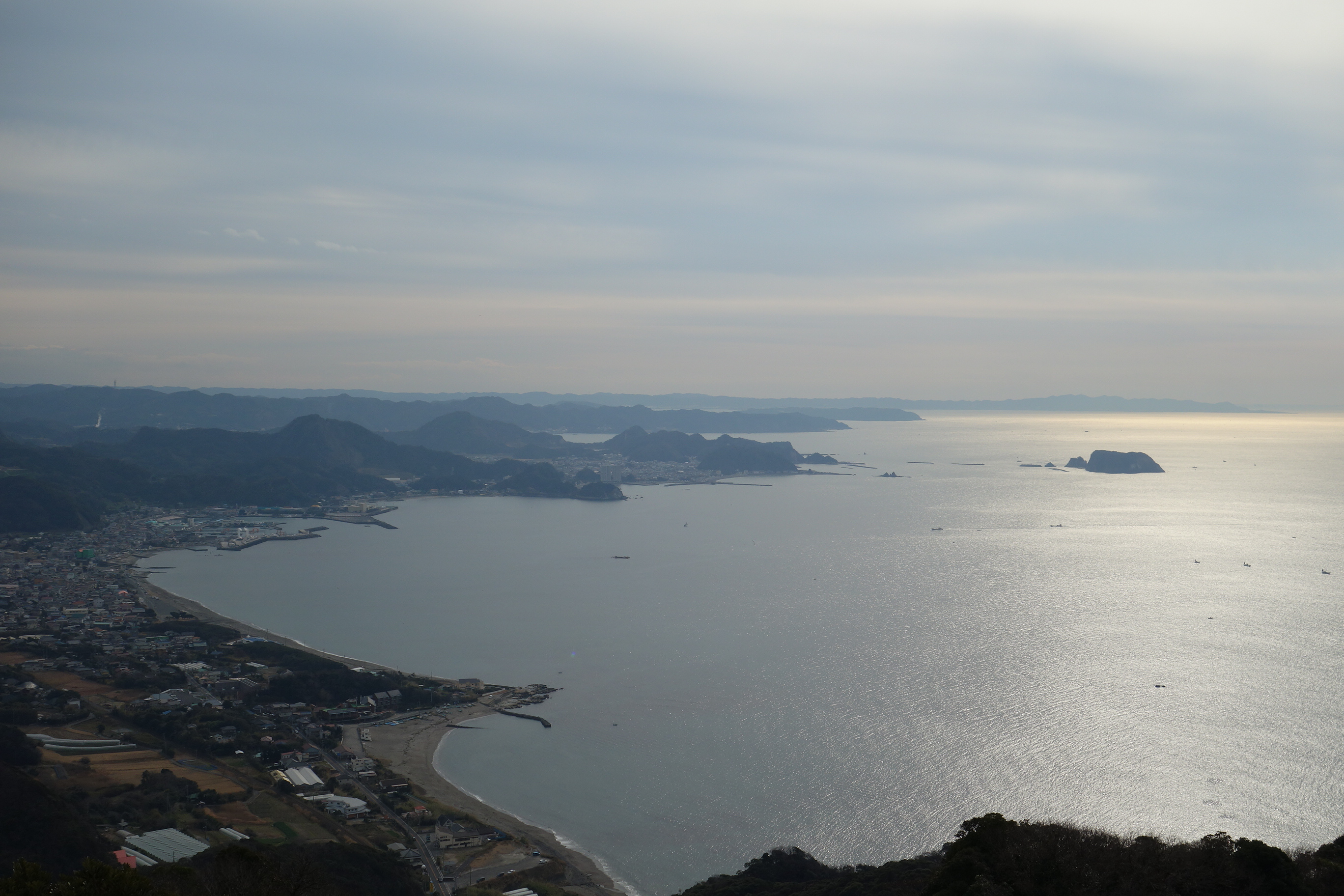 鋸山から保田方面 Hota view from Mt. Nokogiri 20130105